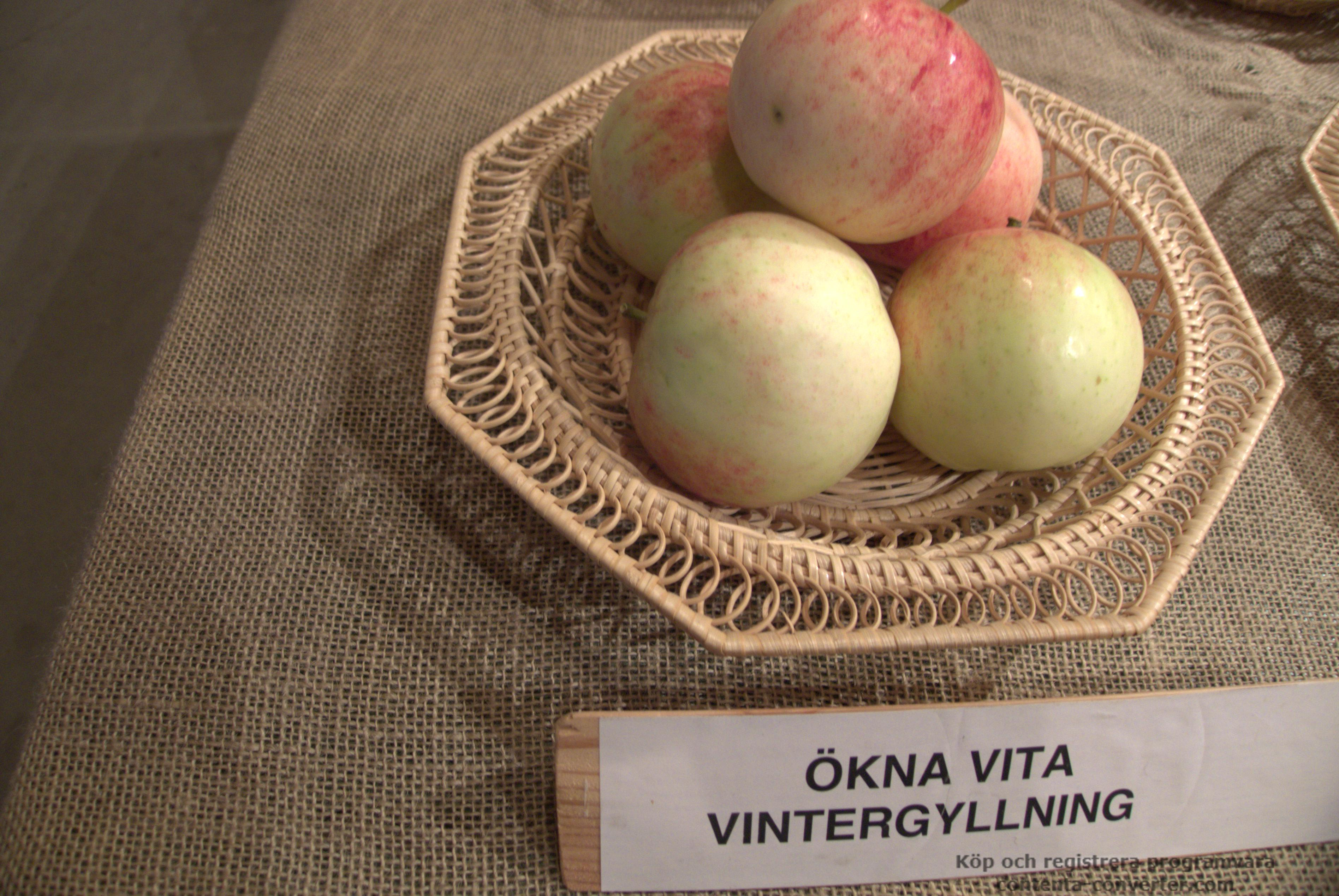 Äpplen av sorten Ökna Vita Vintergylling